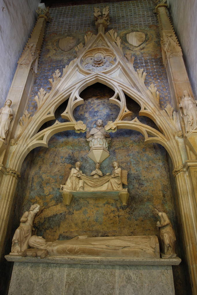 Sepulcre d'Elisenda de Moncada al monestir de Pedralbes: banda del claustre